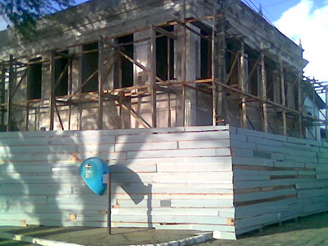 Casarão sendo reformado